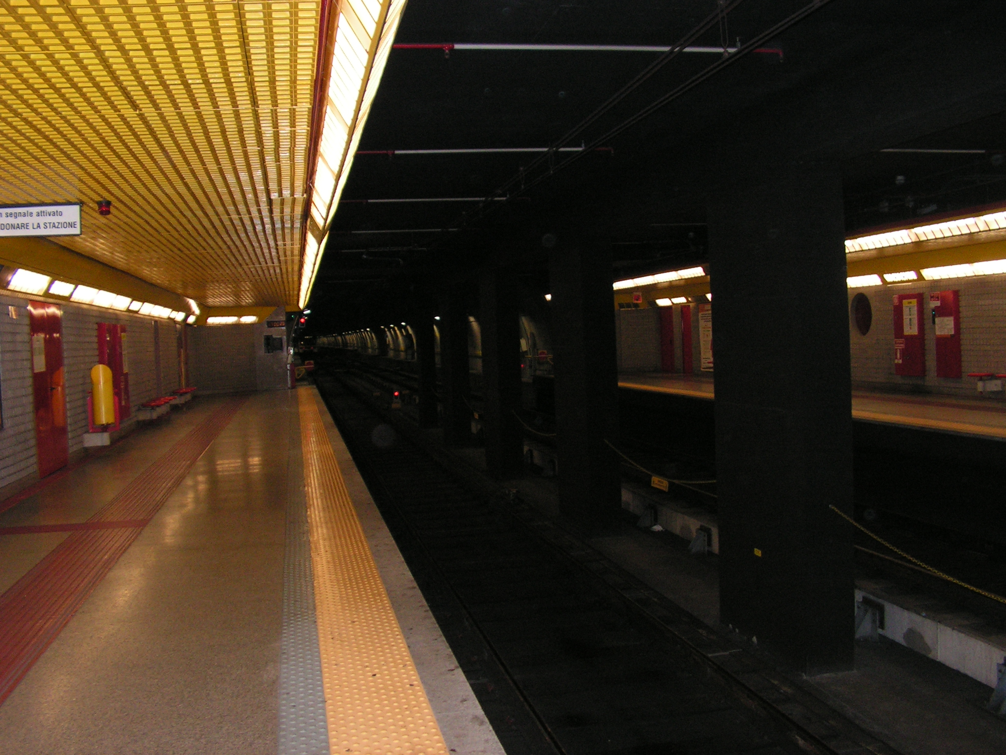 Metropolitana 3 Milano ottobre 2007 Autore utente:DracoRoboter